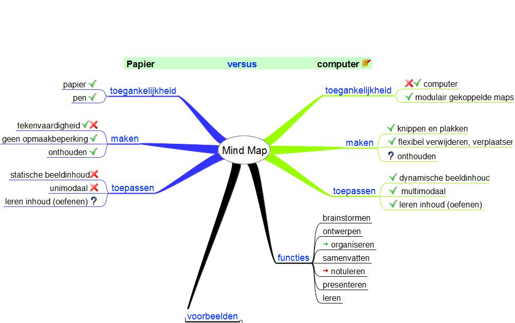 Vergelijking toepassingsmogelijkheden mindmap op papier en met de computer. Samenvatting toepassingsmogelijkheden mindmap op de computer.